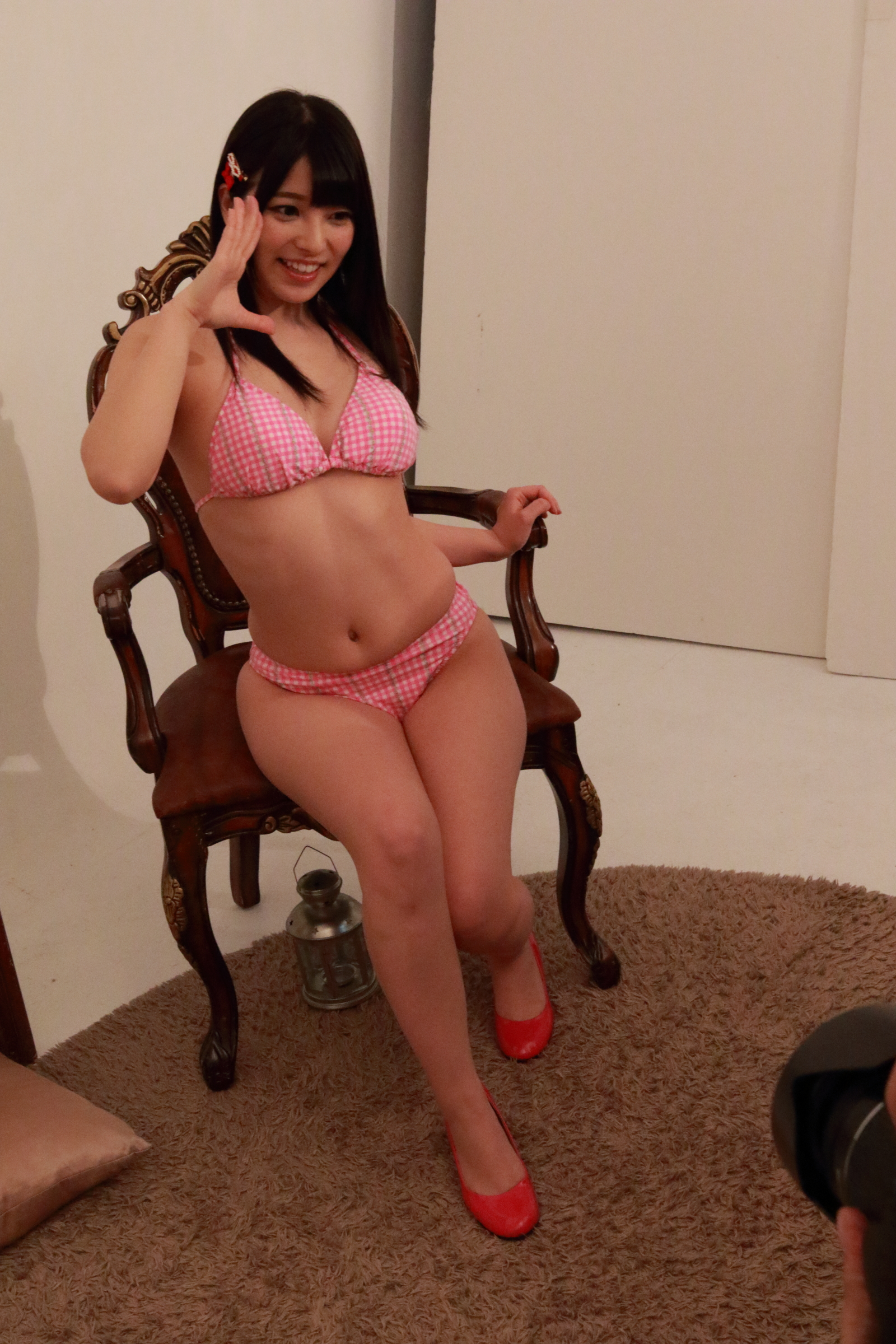 Honey's Secret Party 2 in台灣，上原亞衣攝影會。